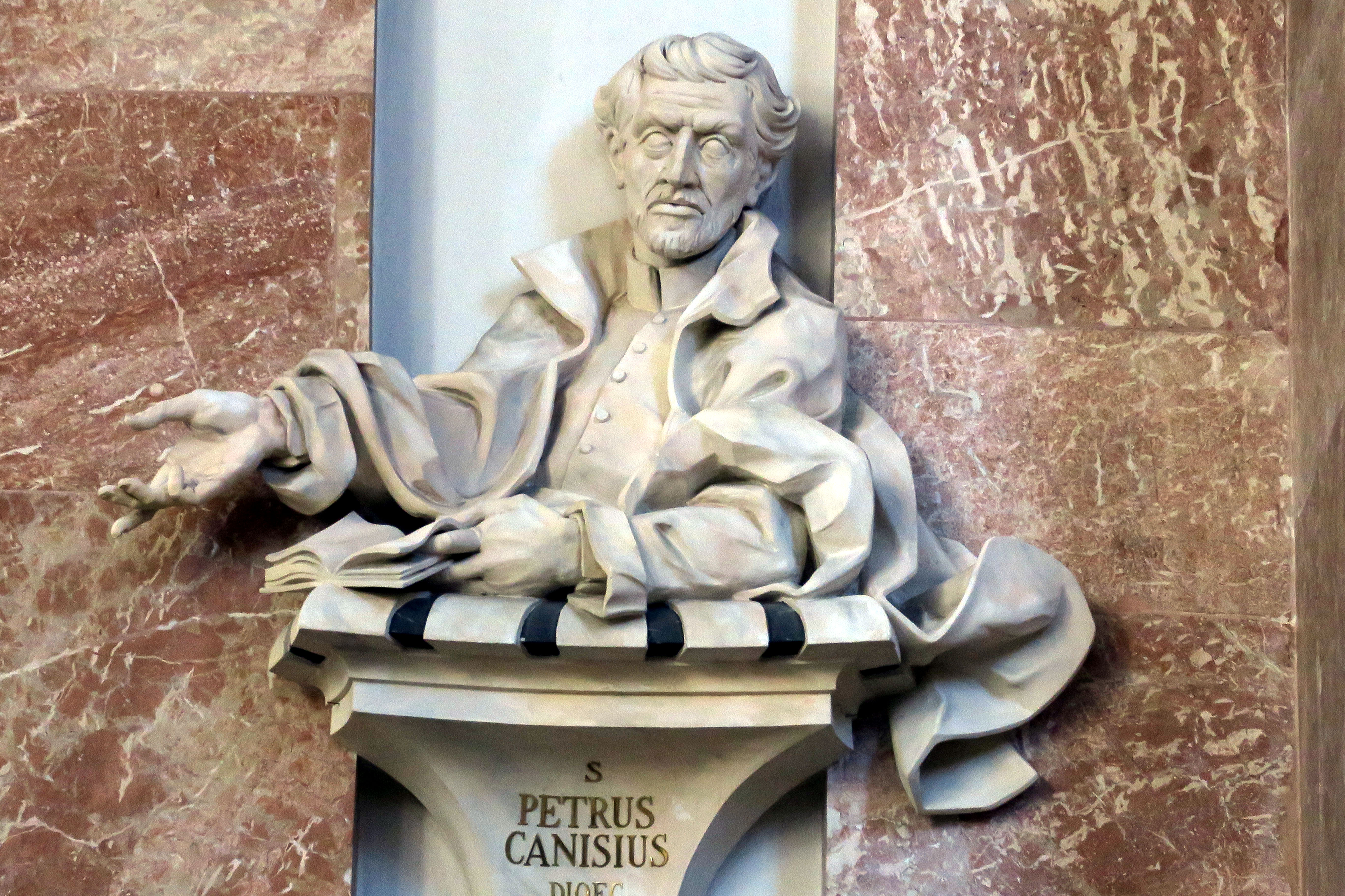 Der Kirchenlehrer Petrus Canisius, von 1554 bis 1555 Administrator der Diözese Wien, Patron der Diözese Innsbruck, Skulptur gegenüber der Kanzel im Innsbrucker Dom